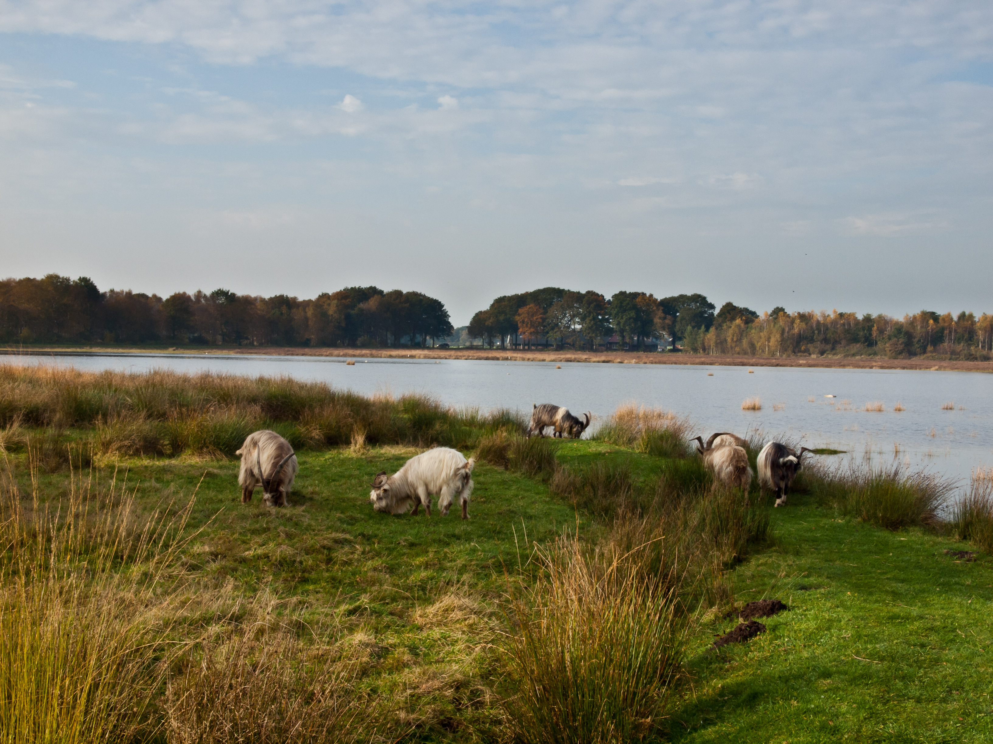 Land geiten op de Jilt Dijksheide